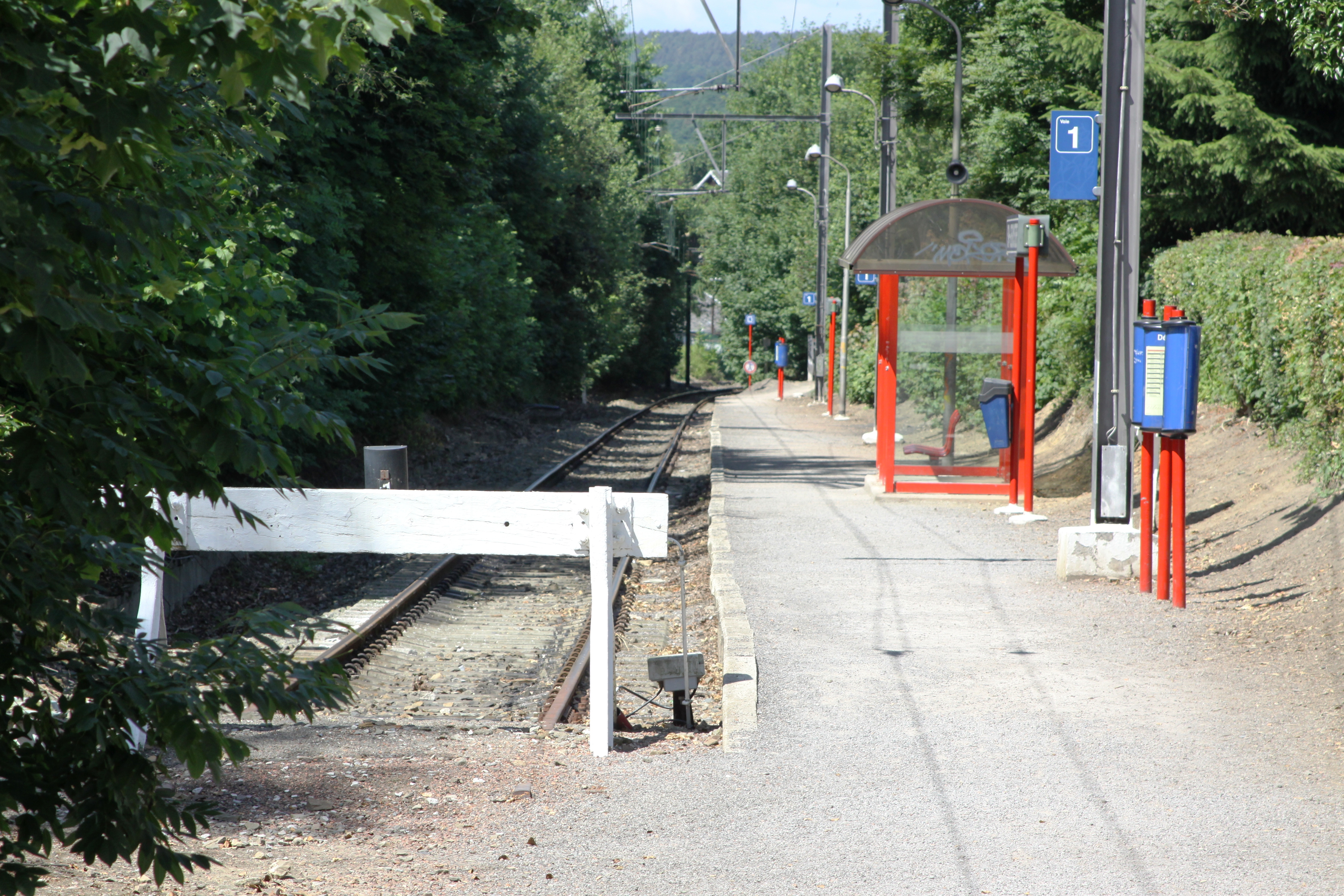 Terminus Spa-Géronstère